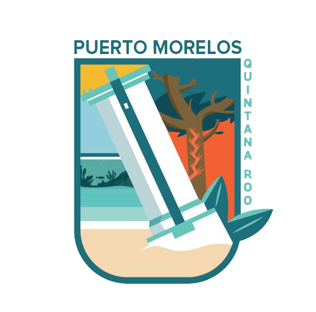 Escudo de armas de Puerto Morelos, propiedad del Gobierno de Quintana ROo